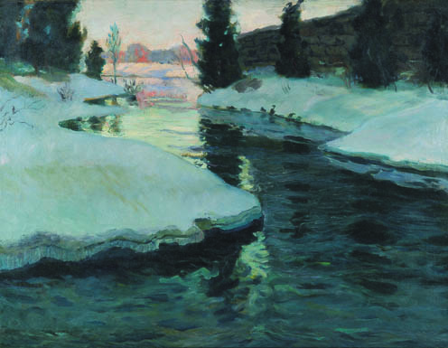 Головков Герасим СЕменович Оттепель (холст, масло, 71x92) в частной коллекции